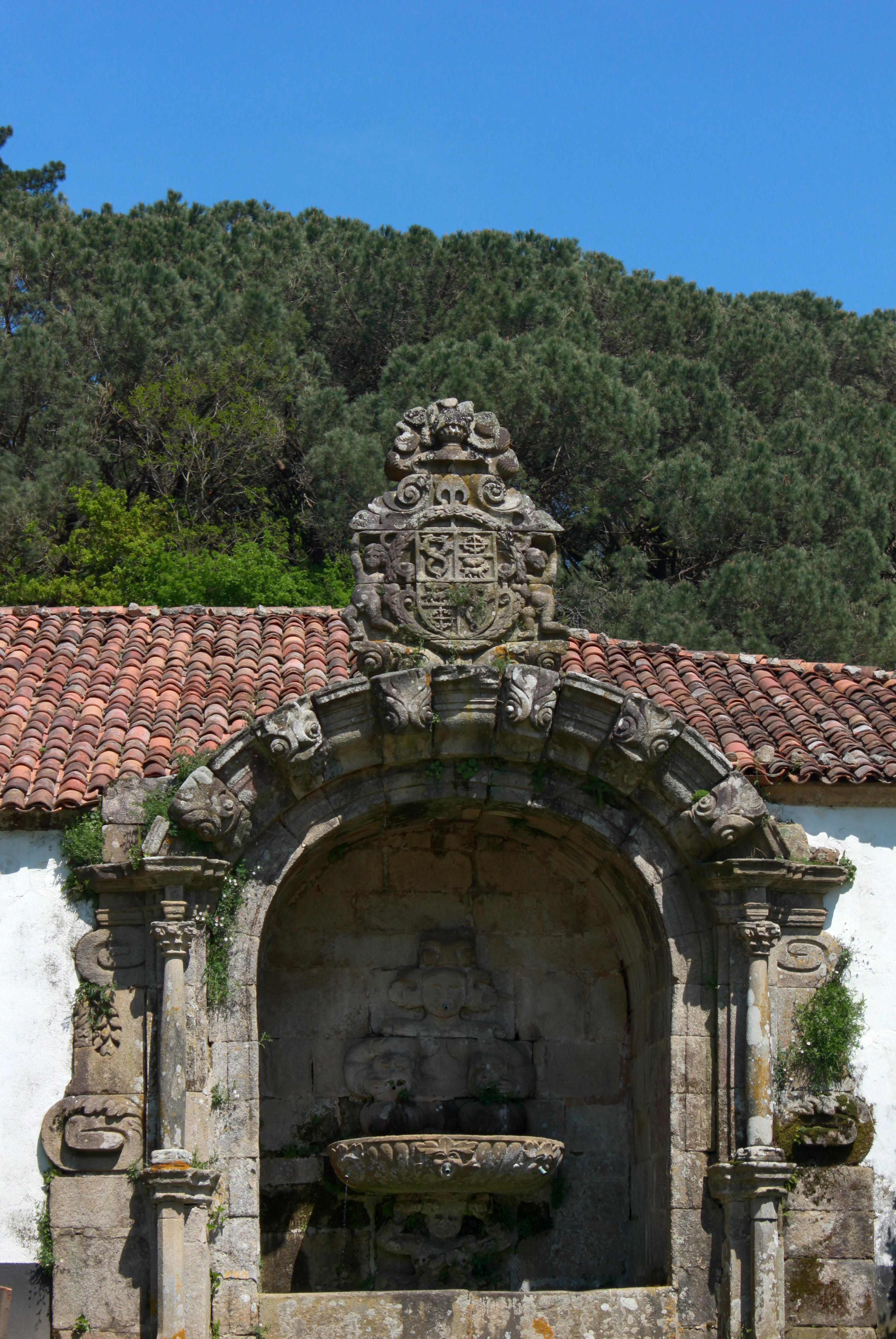 Escudo de armas e fonte no pazo de Santa Cruz de Ribadulla, Galicia, España.